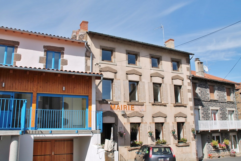 la Mairie